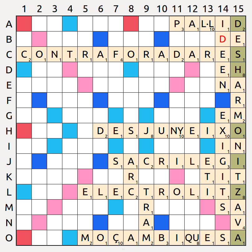 Escrable en català de 1.725 punts